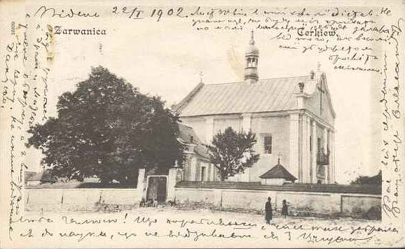 Троїцька церква, Зарваниця (поштівка)